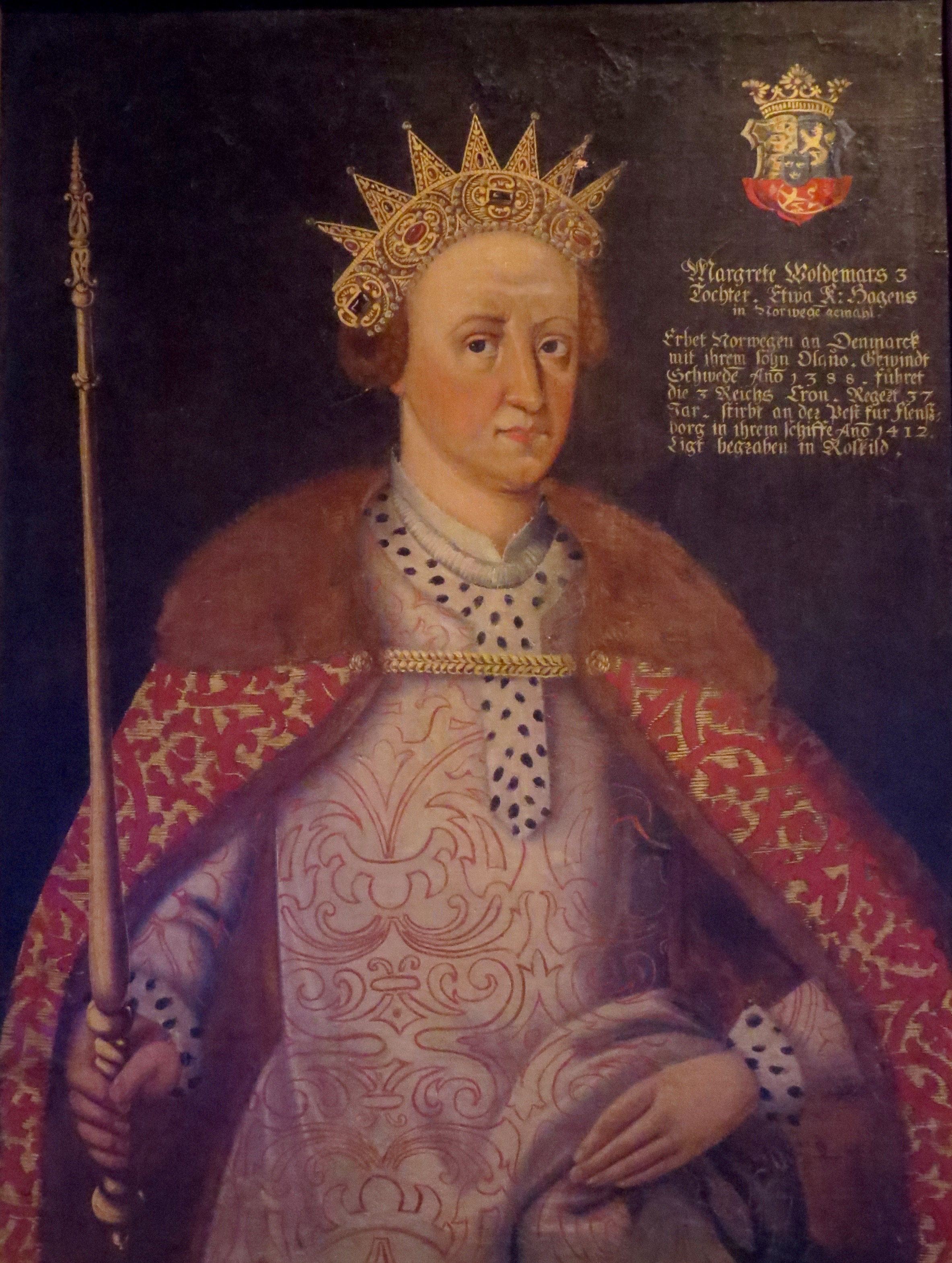 Margrete Woldemars 3 Tochter. Witiva K: Hagens in Norwege gemahl. Erbet Norwegen an Denmarck mit ihrem sohn Olauo. Gewindt Schwede Ano 1388. führet die 3 Reichs Cron. Regezt 37 Jar. Stirbt an der Pest sur Flensborg in ihrmen schiste Ano 1412. Ligt begraben in Roskild. Historiserende maleri forestillende Margrete Valdemarsdatter, Historisk Museum i Lund, Sverige